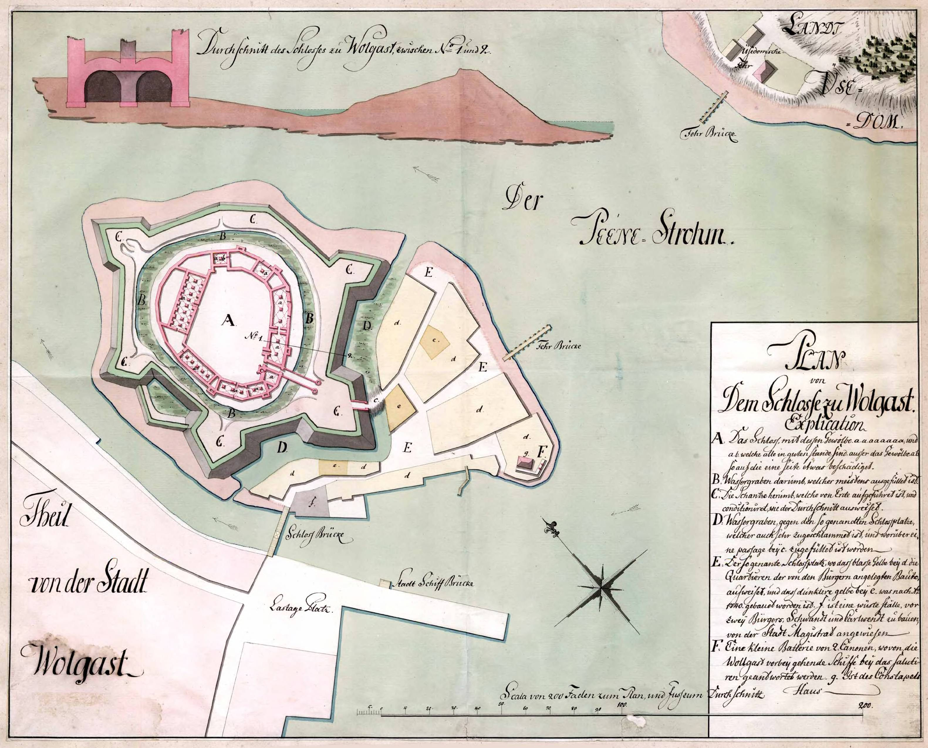 Wolgast: Plan von Dem Schlosse zu Wolgast.